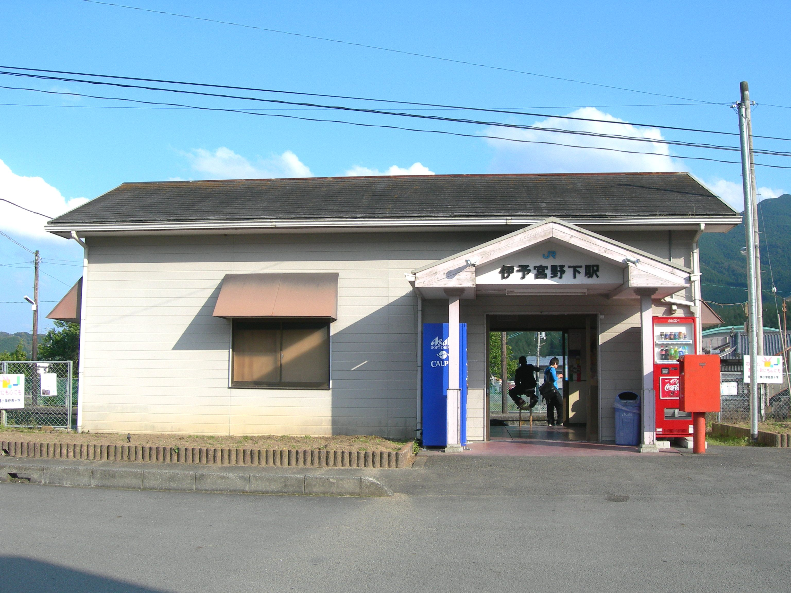 予土線 伊予宮野下駅